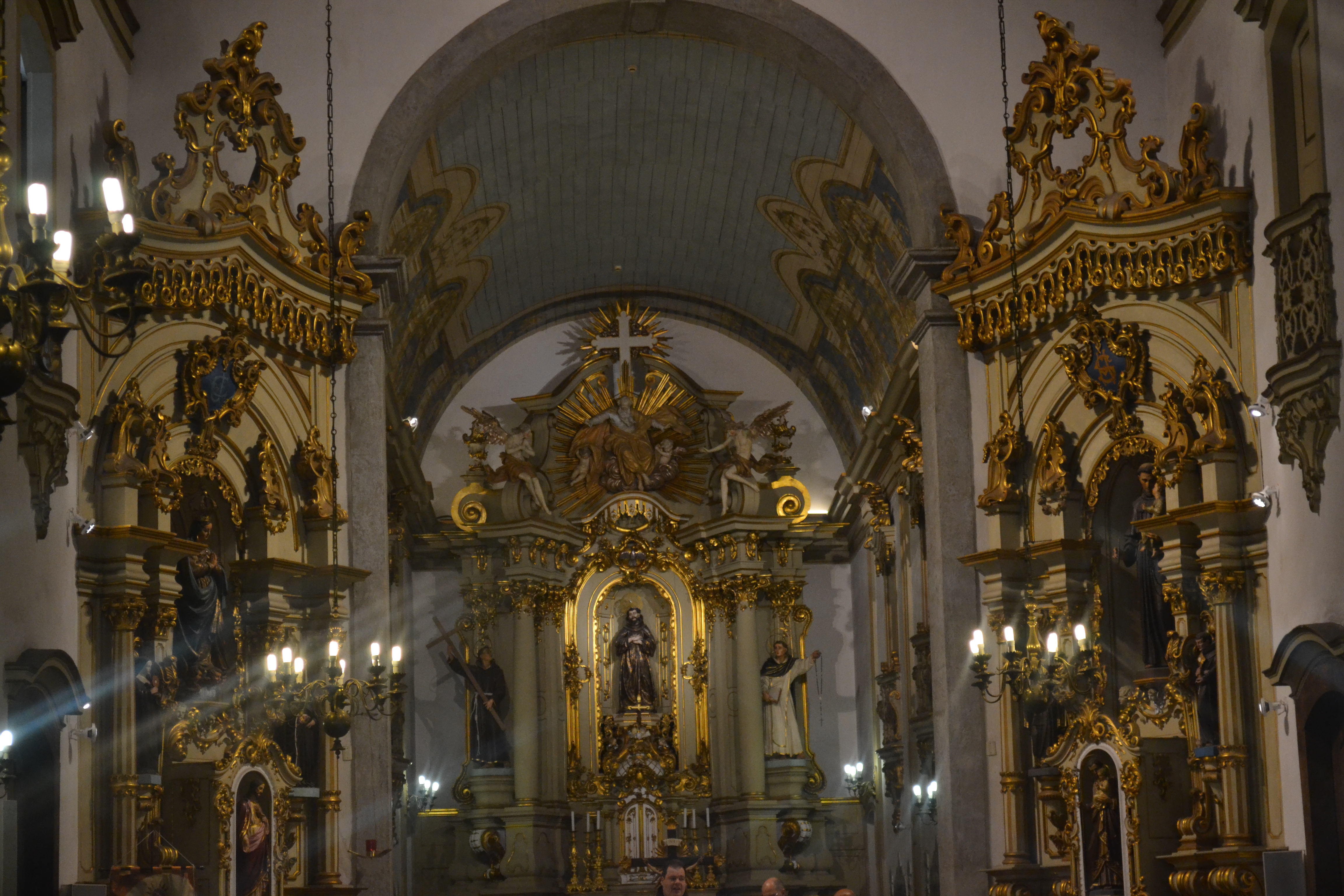 Interior da Igreja de São Francisco, em São Paulo (SP), Brasil.